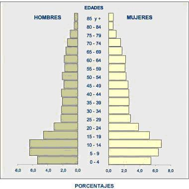 Piramide de población del Cantón Colta, en la provincia de Chimborazo en el Ecuador